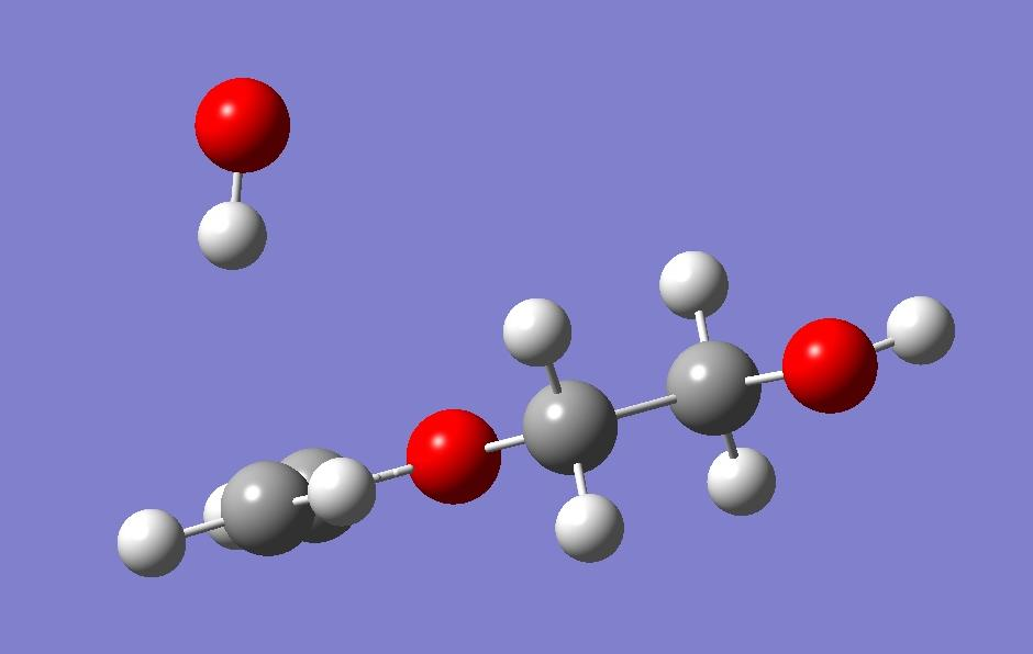 Simulacion hecha en g09, en la Univarsidad Autonoma Metropolita, hecha por estudiantes